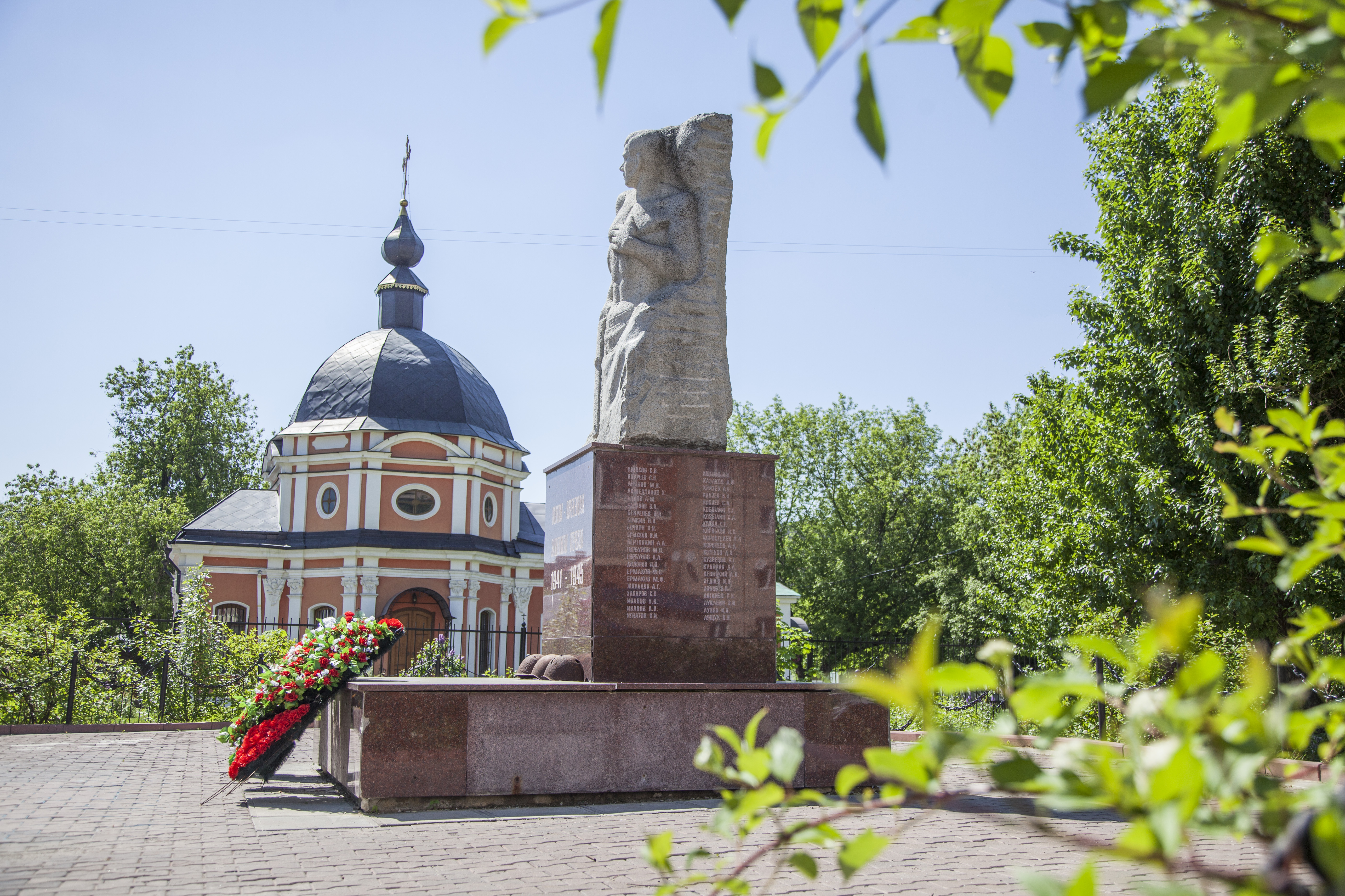 Памятник погибшим кореневцам в годы ВОВ